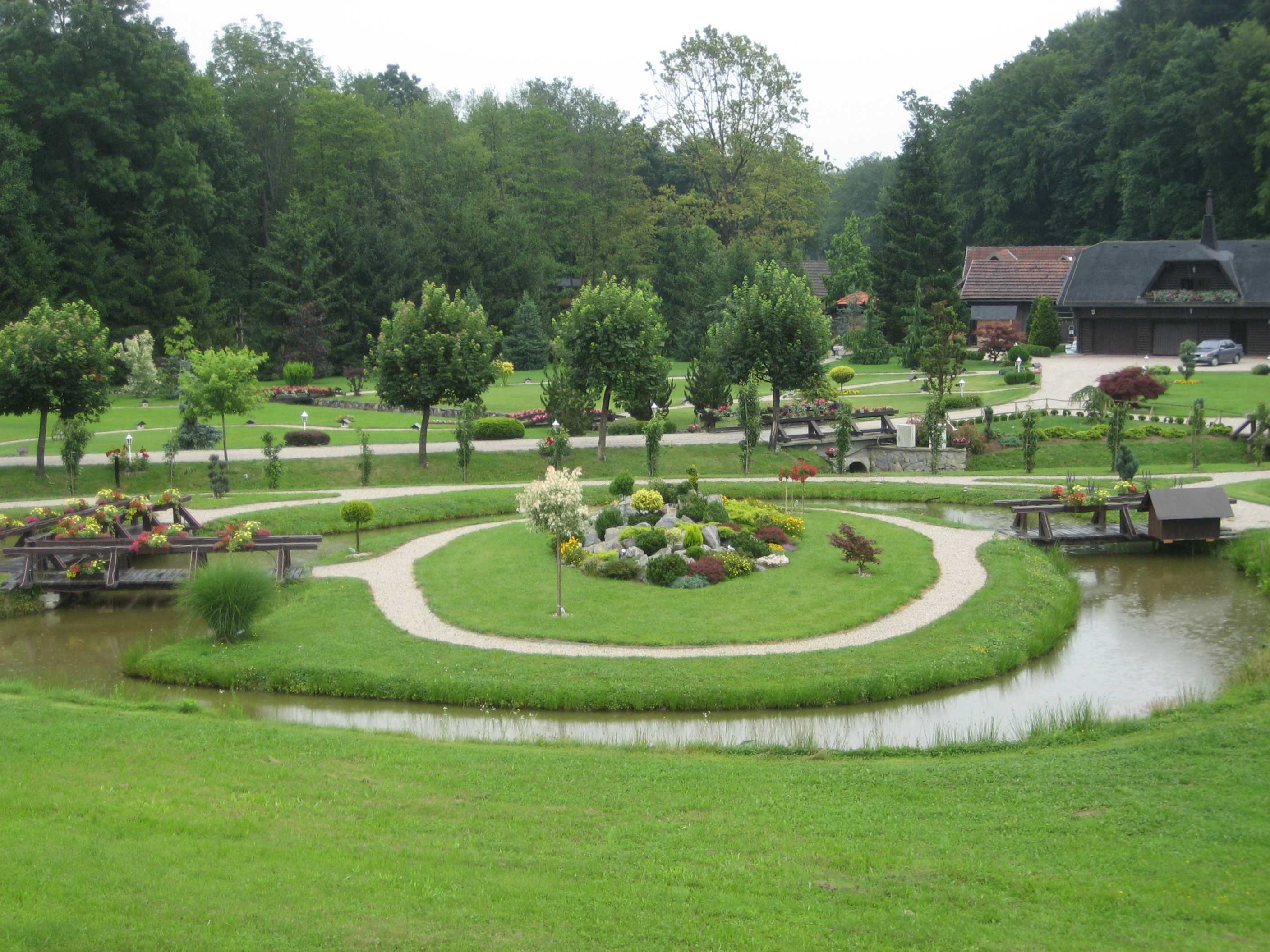 Agroturizam, Grabovnica, Croatia